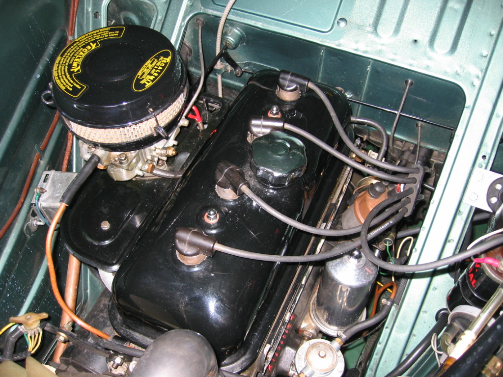 Peugeot 203 coupé cabriolet de Bernard Beucler - 25420 Bart - Franche Comté